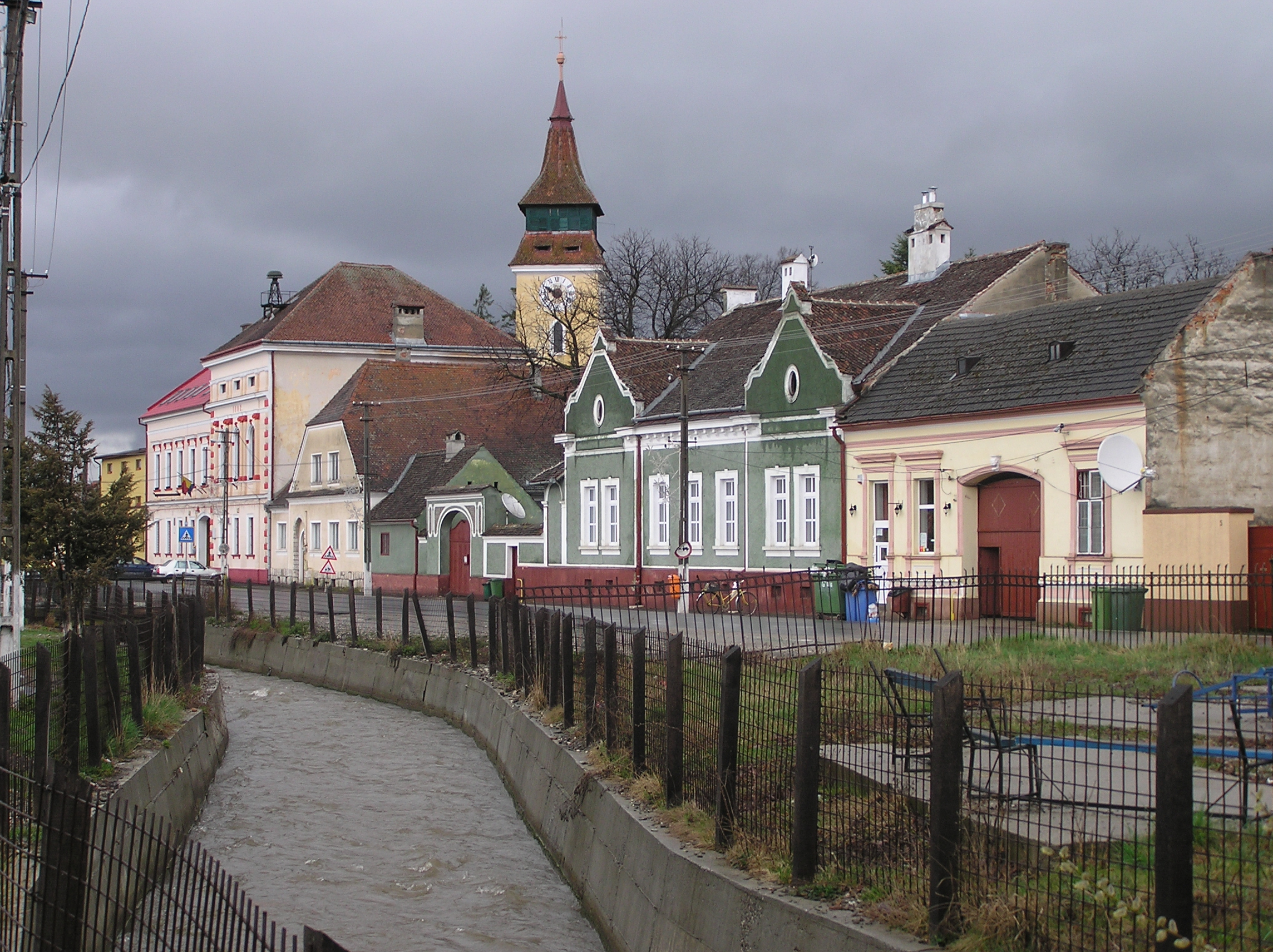 Der Bach Neugraben (Vulcăniţa) in der Gemeinde Vulcan (Wolkendorf), Burzenland, Siebenbürgen, Rumänien.